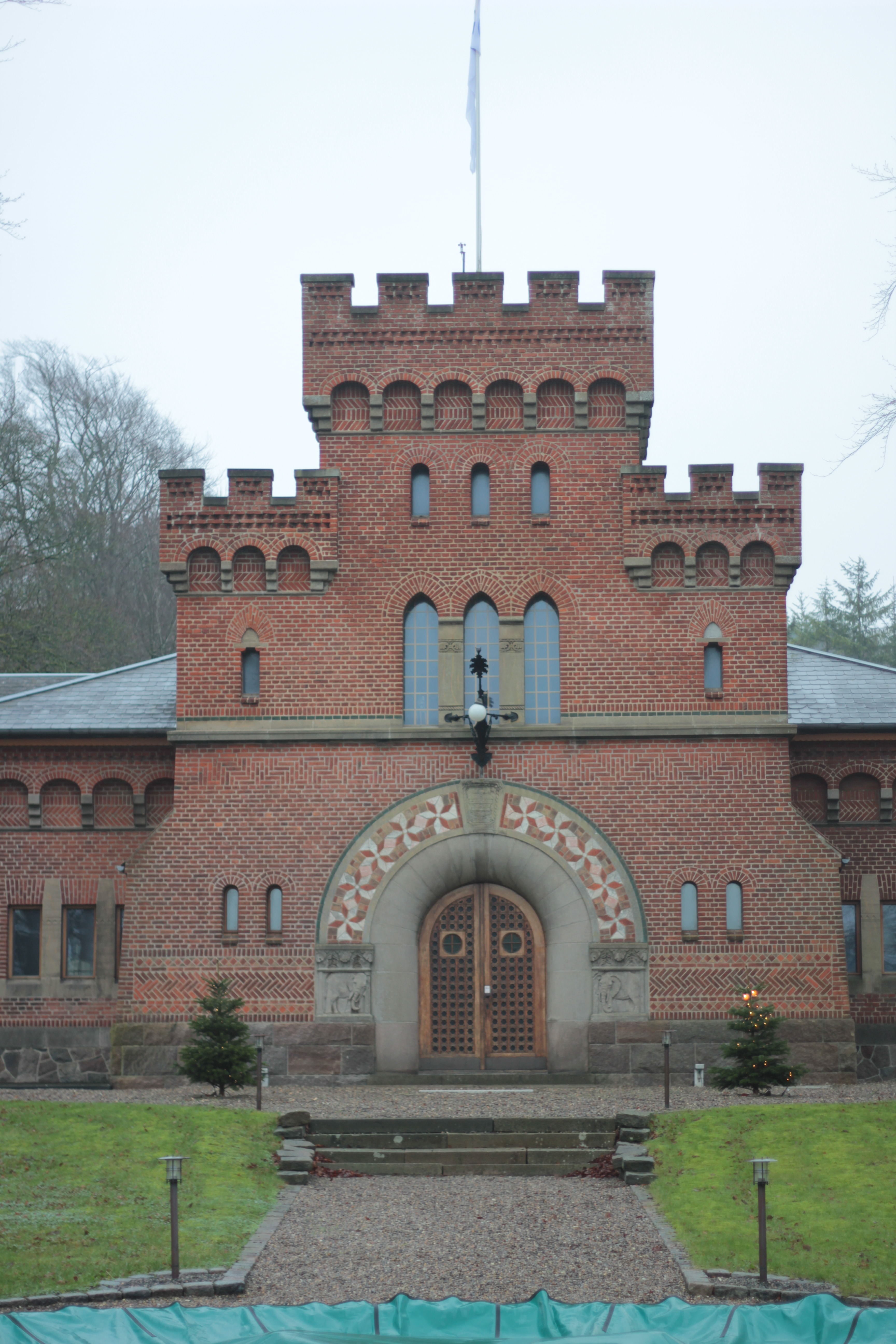 Det gamle vandværk i Aalborg, idag anvendes det til Vandteknisk Museum